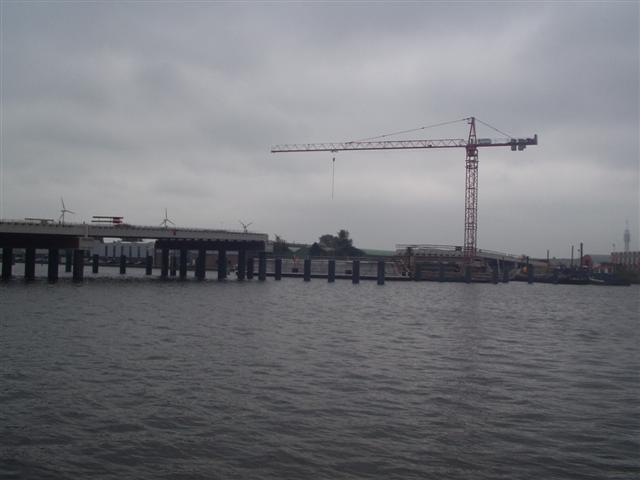 De in aanbouwzijnde Schoterbrug in Haarlem